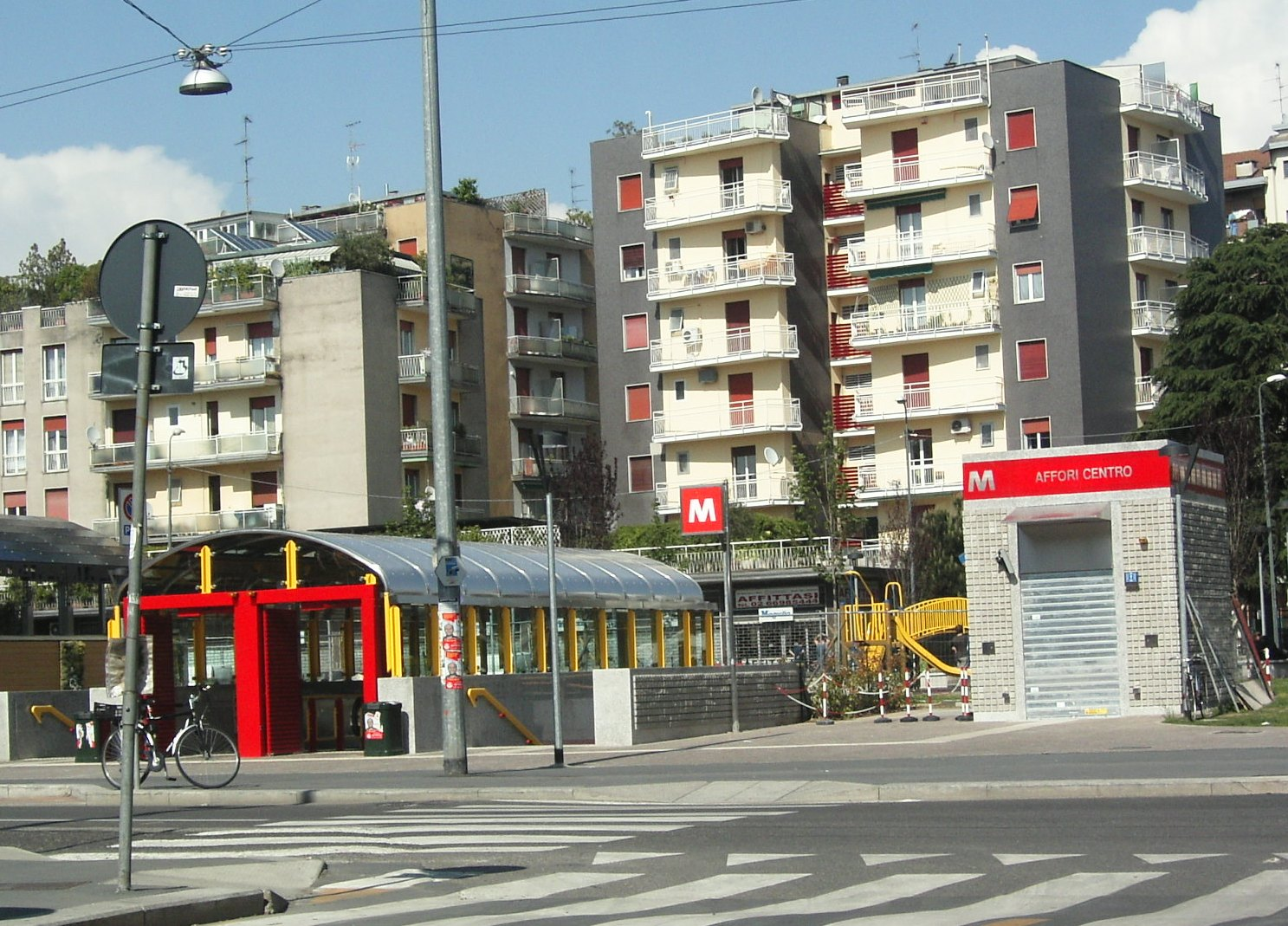 Esterno della stazione Affori Centro M3